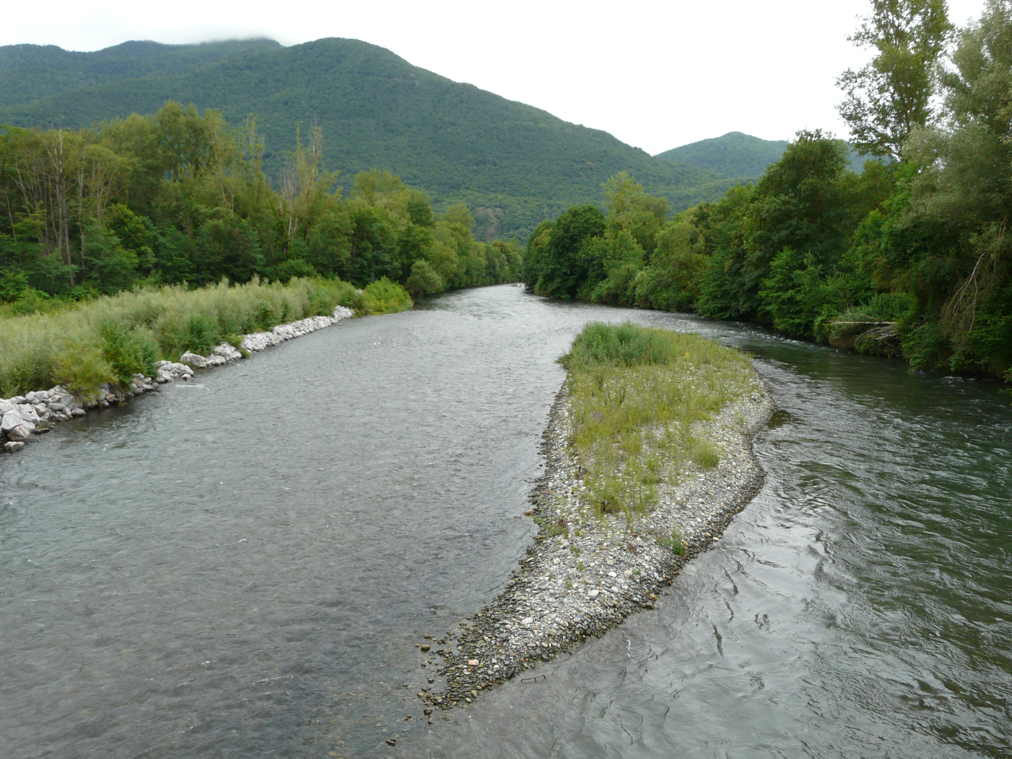 La Garonne en amont du pont qui relie les routes départementales 33a (Haute-Garonne, commune d'Ore à gauche) et 121 (Hautes-Pyrénées, commune de Saléchan à droite).